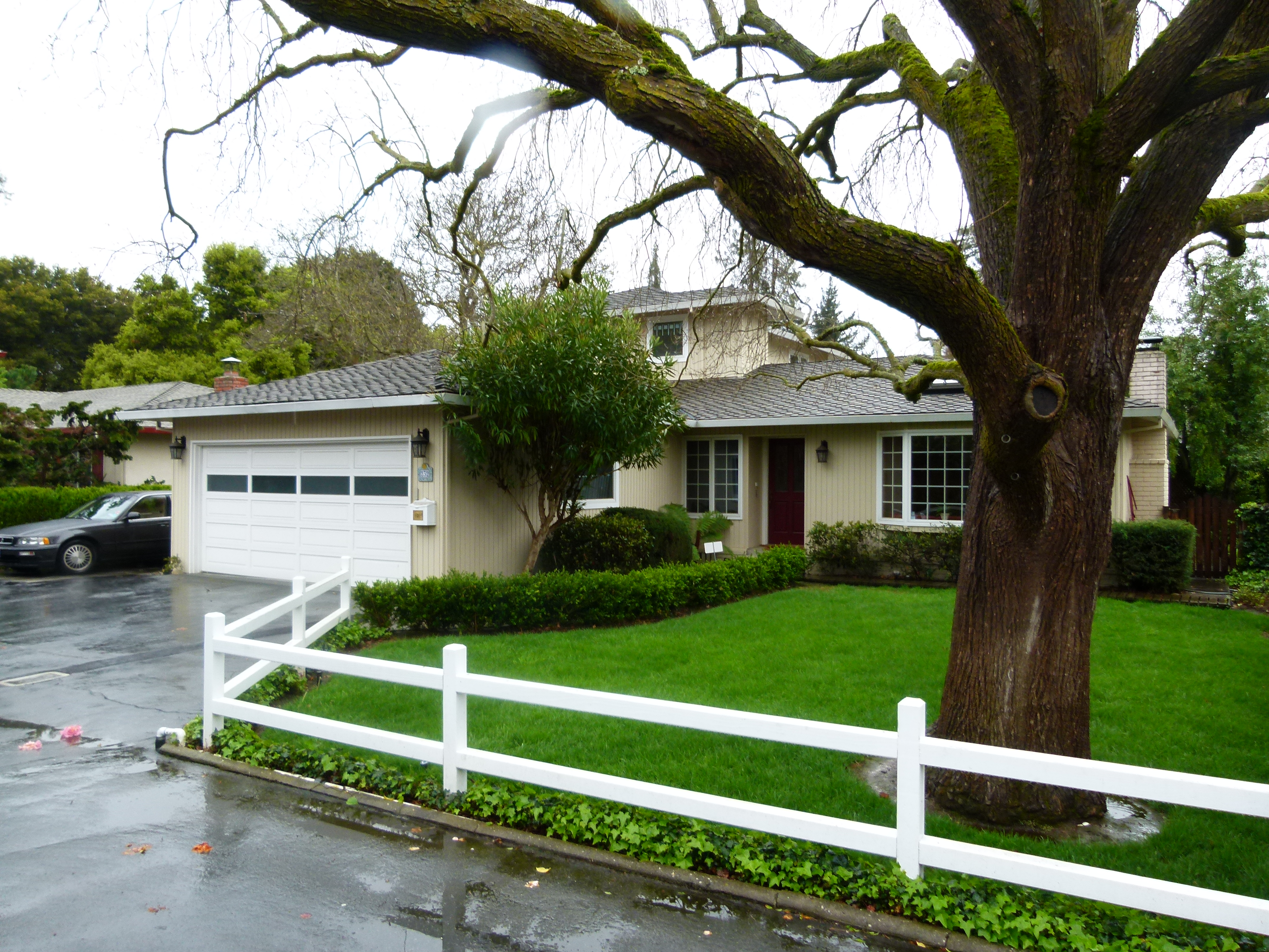 Garatge on va començar Gogole al 232 Santa Margarita Avenue de Menlo Park, Califòrnia